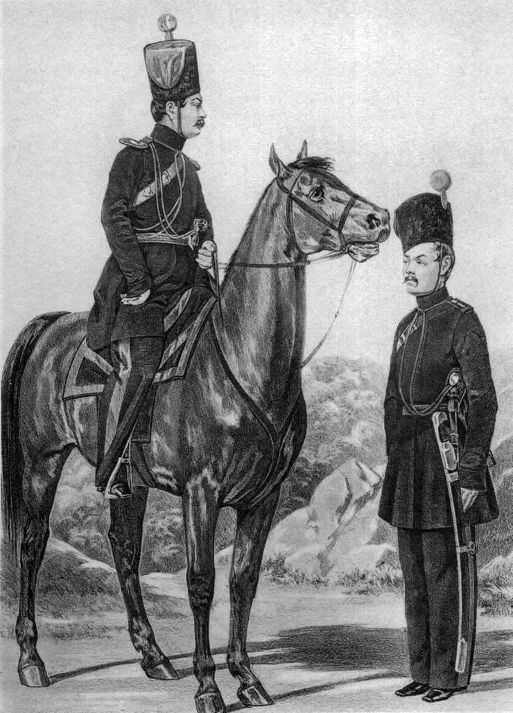 Обер-офицер и Казак Мещерякских кантонов. 1845-1855.